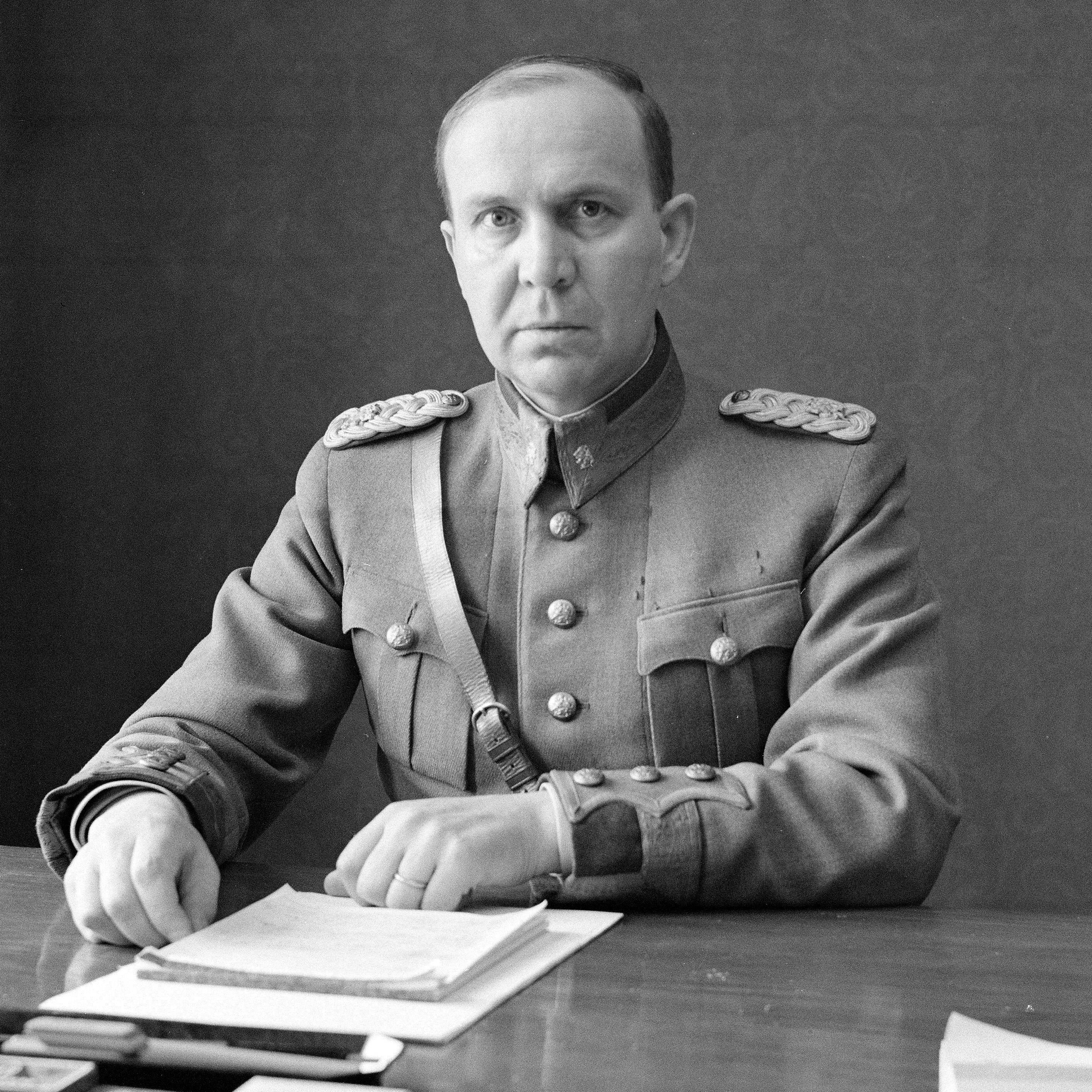 Kenraalimajuri Talvela